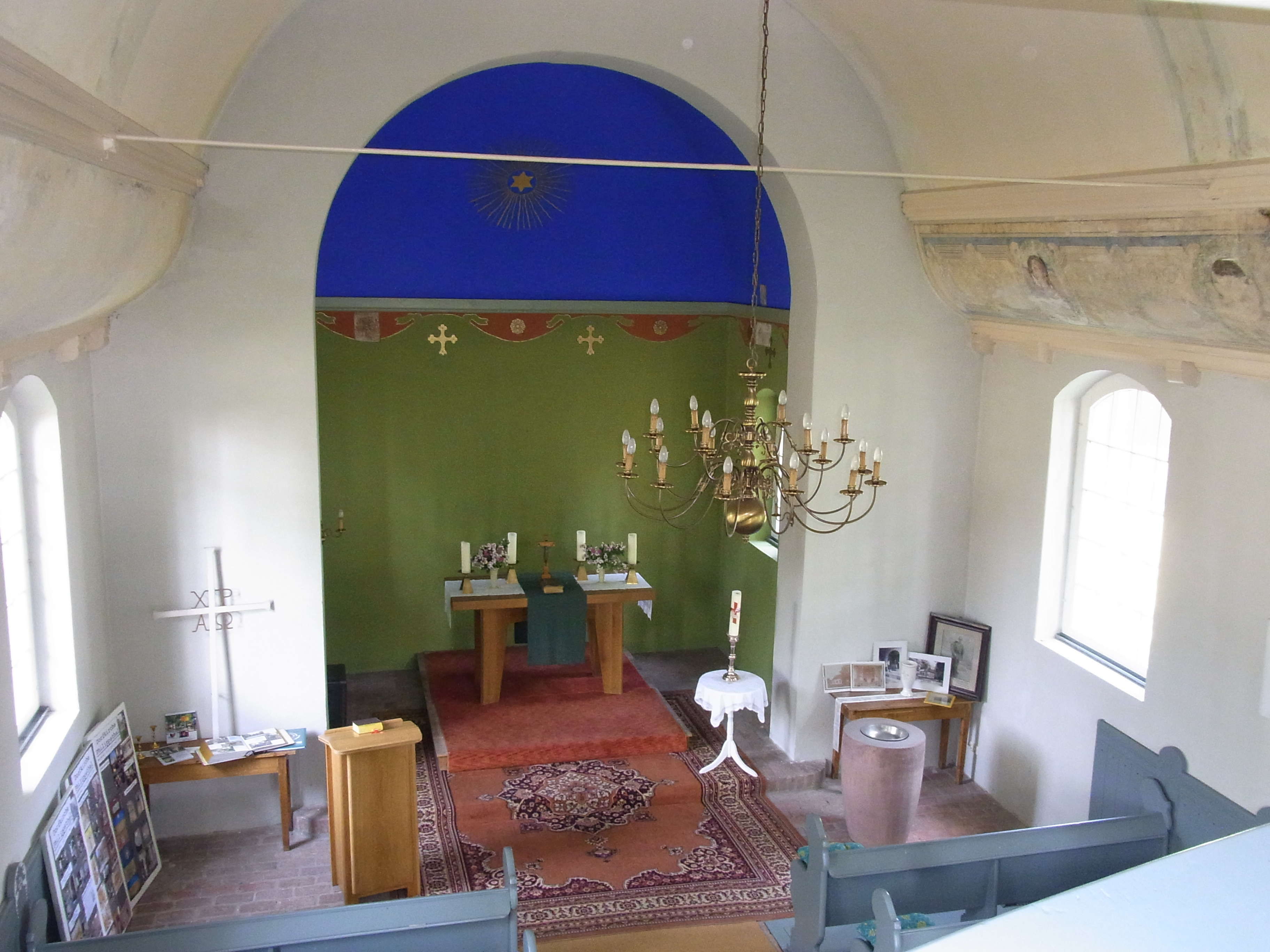 Inneres der Kirche in Philippsthal von der Empore fotografiert. Rechts oben im Bild sind alte Deckenmalereien zu erkennen.